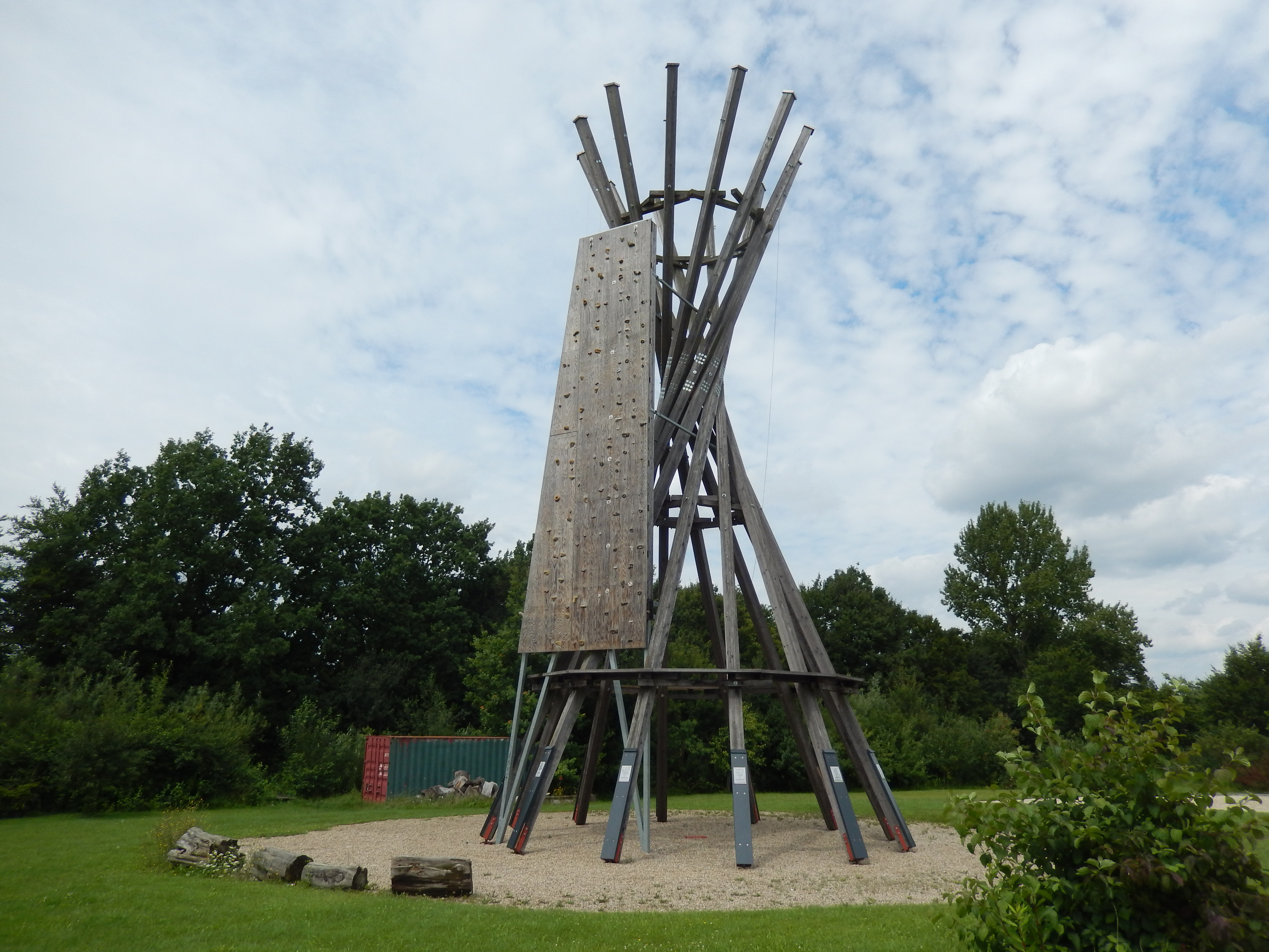 Kletterturm "Kronsberg life tower" in Hannover, ehemals ein Kunstwerk im öffentlichen Raum, jetzt mit Kletterwand